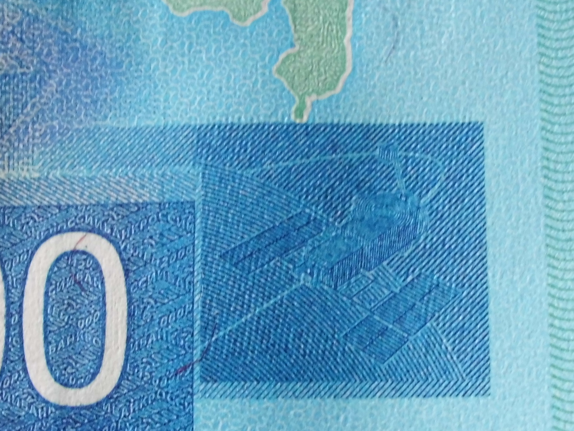 2000 российских рублей образца 2017 года. Реверс. Скрытое изображение. Искусственный спутник (орбитальная станция?) справа снизу на банкноте.